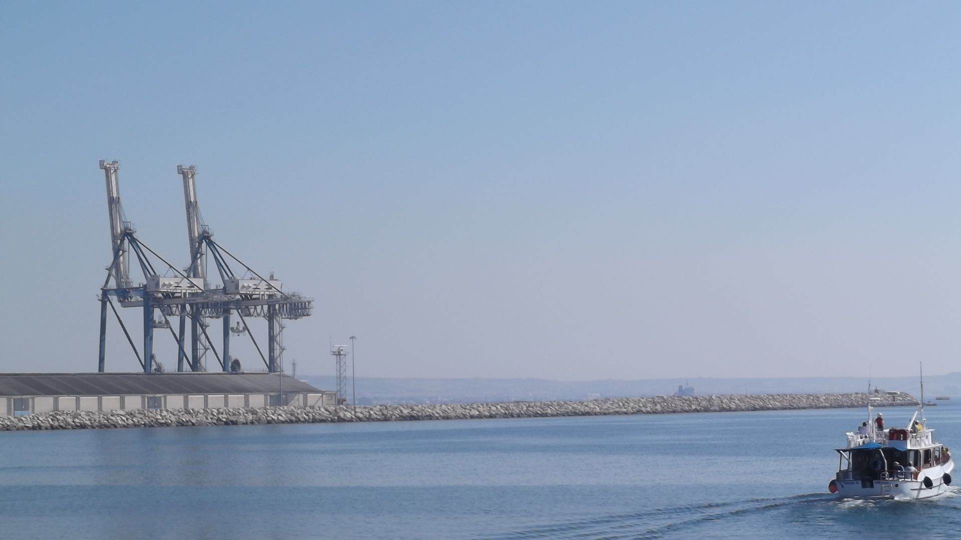 грузовой порт